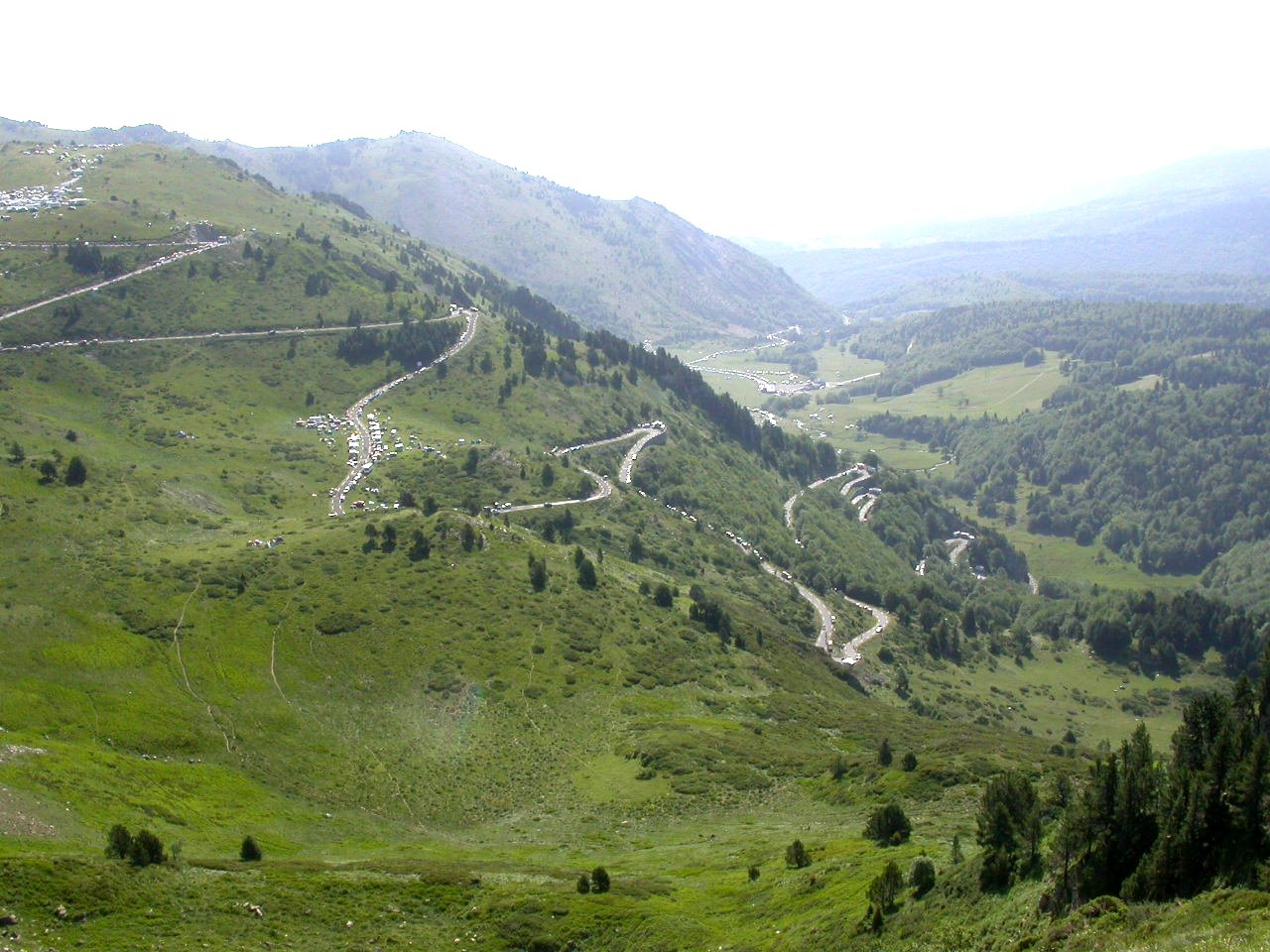 Montée Est du col de Pailhères